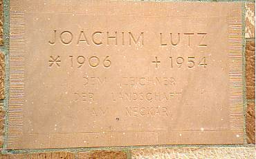 Gedenkplatte an der Friedhofskapelle für Joachim Lutz in HD-Ziegelhausen